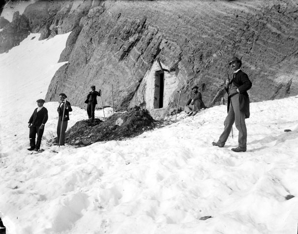 Fonds Trutat - Photographie ancienne Cote : TRU C 573 Localisation : Fonds ancien (S 30) Original non communicable Titre : Vignemale, Russel et Lourdes Auteur : Trutat, Eugène Rôle de l’auteur : Photographe Lieu de création : Vignemale, Massif du (France) Date de création : 1859-1910 [entre] Mesures : : 9 x 11 cm Observations : Notes de la main de E. Trutat : "positive d'après cliché Vallon" Mot(s)-clé(s) : -- Montagne -- Sommet (montagne) -- Homme -- Porte -- Maison -- Neige -- Rocher -- Grotte -- Russel, Henry Comte -- Lourde Rocheblave, Léonce -- Vignemale, Massif du (France) -- Vignemale (France ; grottes) -- La Pique Longue (Hautes-Pyrénées) -- Hautes-Pyrénées (Midi-Pyrénées) -- Midi-Pyrénées (France) -- Pyrénées (France) -- 19e siècle, 2e moitié -- 20e siècle, 1e quart Médium : Photographies -- Négatifs sur plaque de verre -- Noir et blanc -- Portraits -- Paysages Bibliothèque de Toulouse. Domaine public